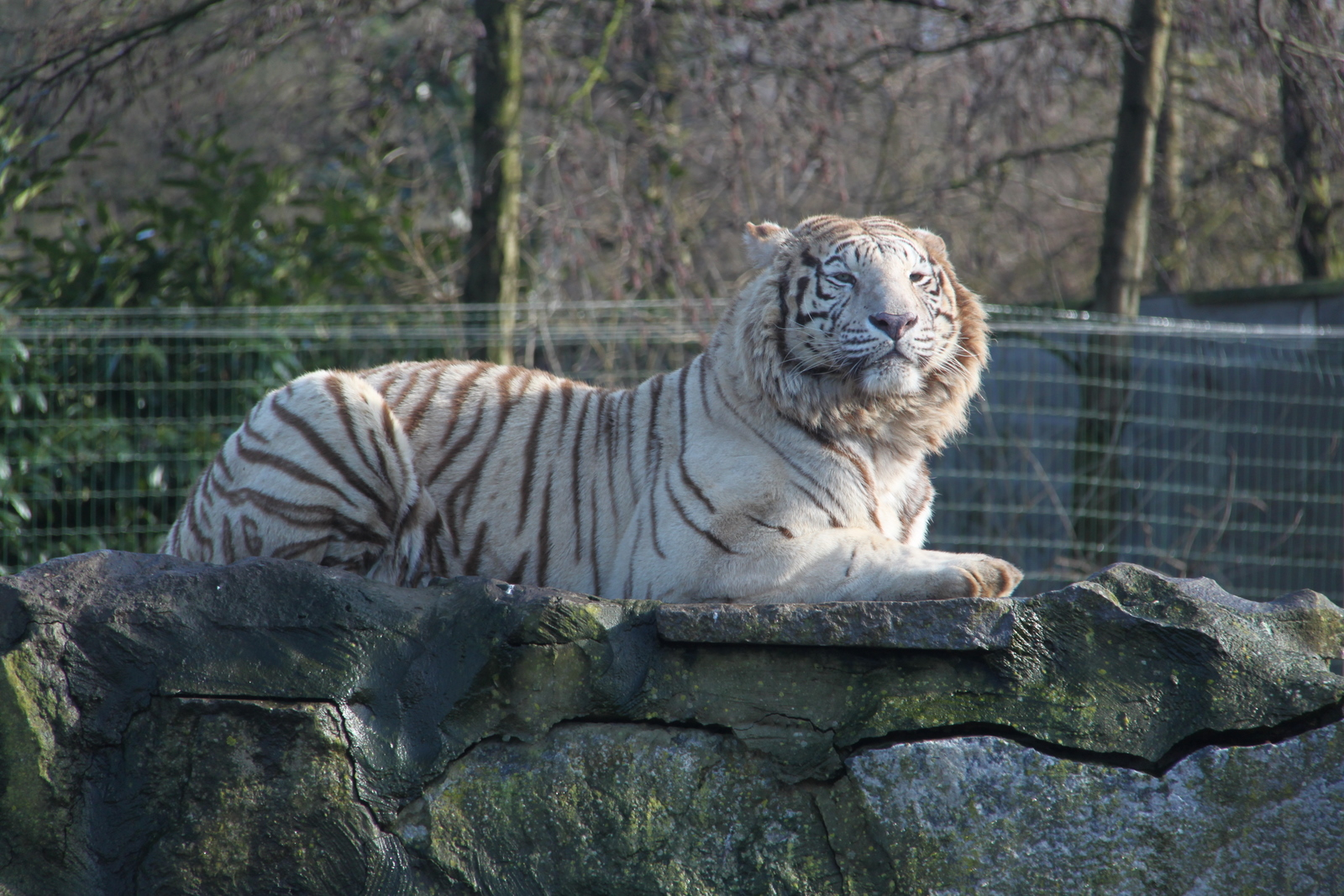 20120219 Olmense Zoo